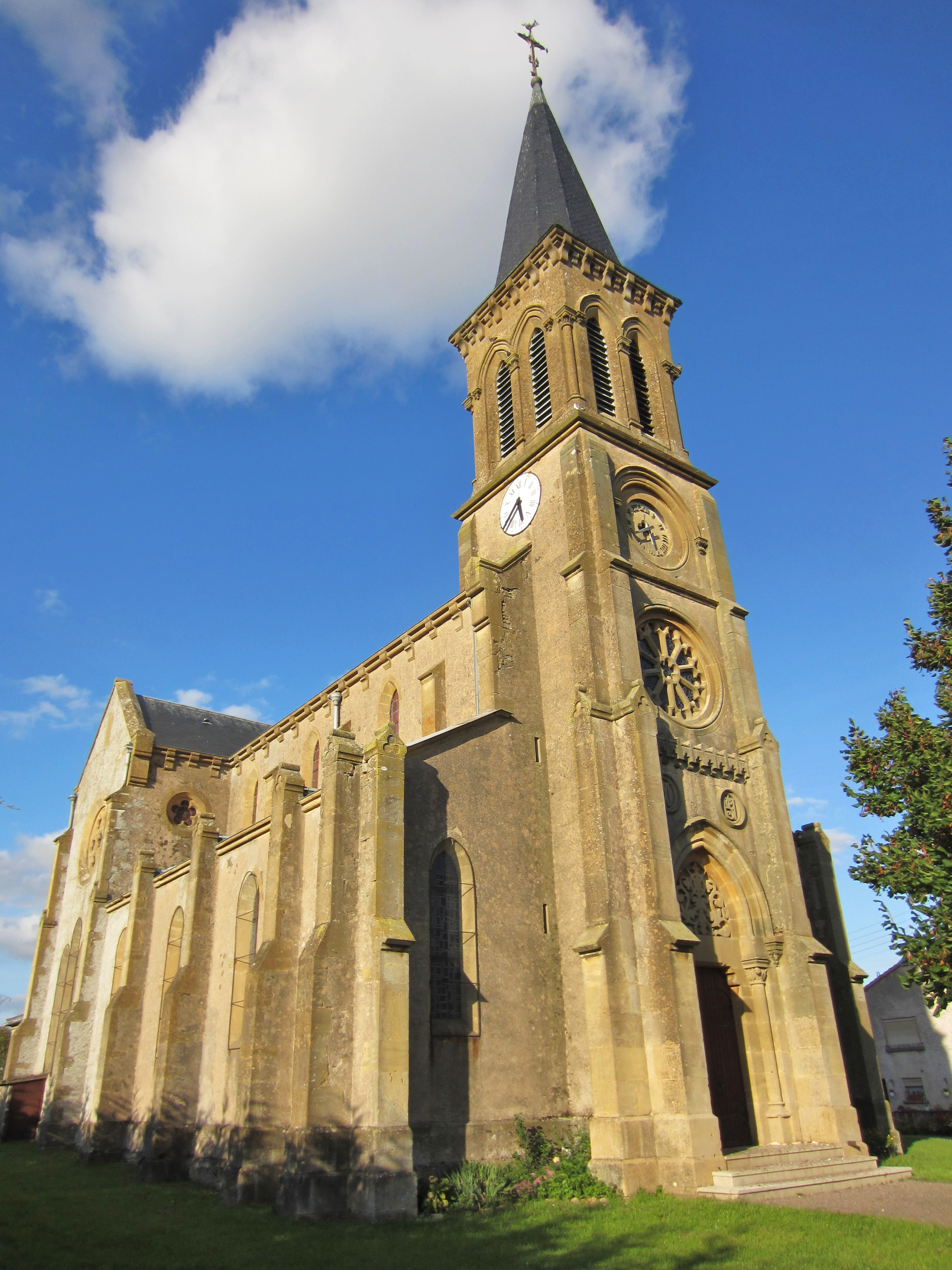 Description eglise Fleville Lixieres eglise Fleville Lixieres